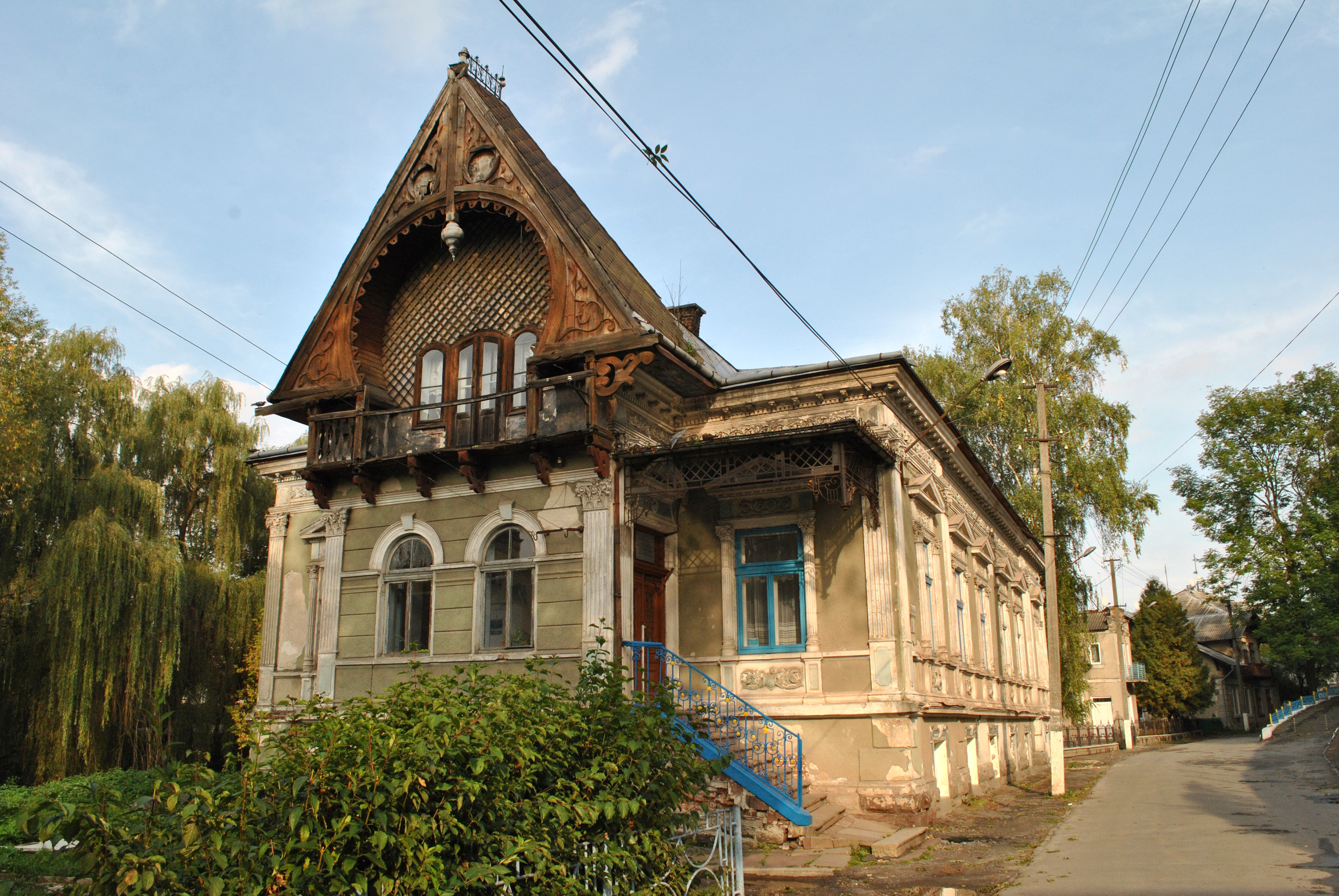 Будинок на вул. Шкільній у Бучачі Тернопільської області: дитяча медична консультація.